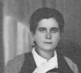 Giuseppina Panzica (Caltanissetta, 1 agosto 1905 – Como, 15 febbraio 1976)